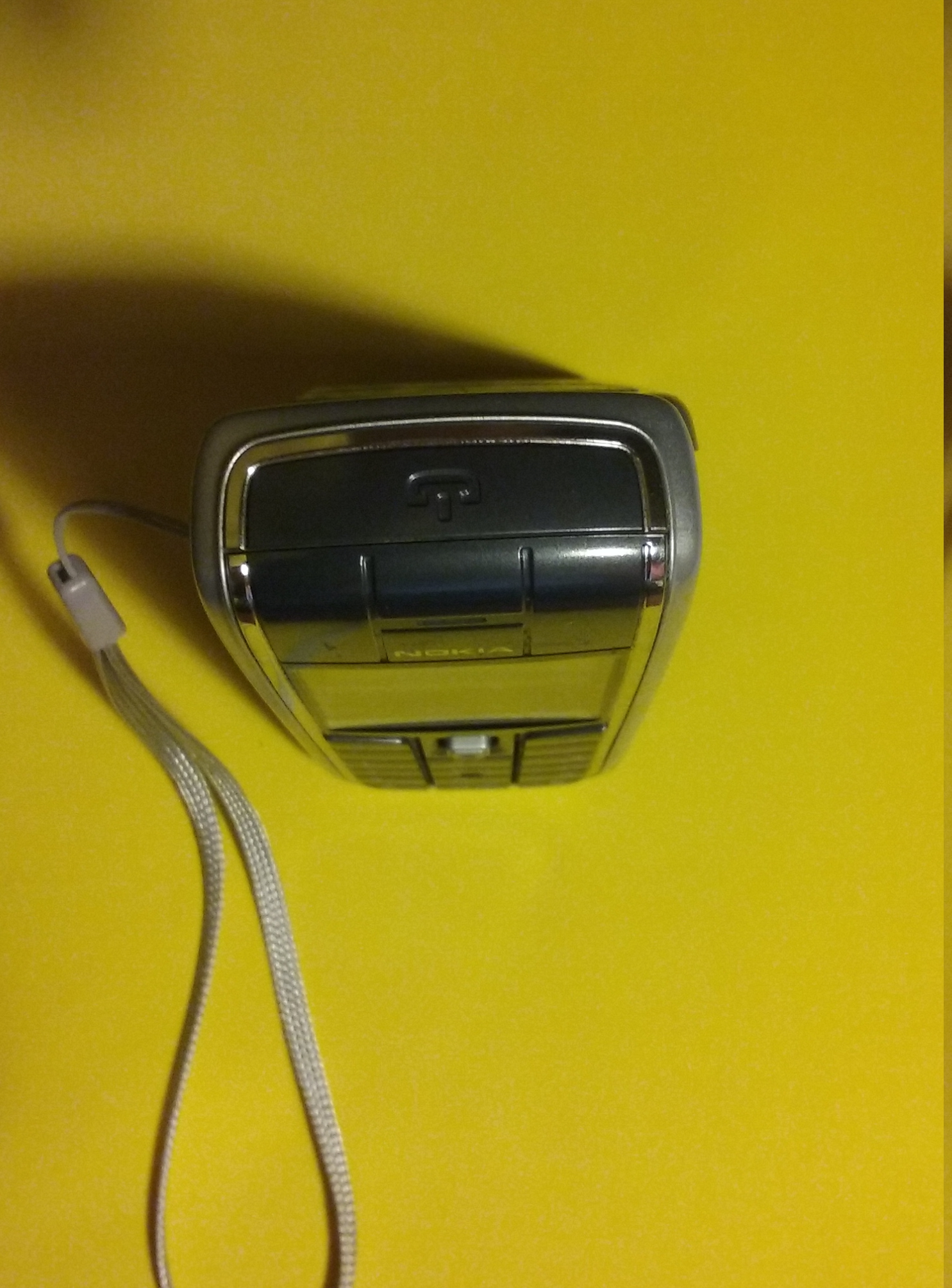 Przycisk włączający w Nokii 6020